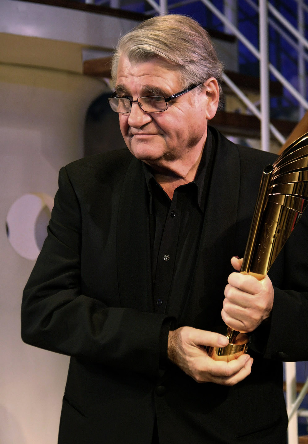 Peter Turrini, geehrt für sein Lebenswerk bei Verleihung des Nestroy-Theaterpreises 2011 im Raimund Theater in Wien.